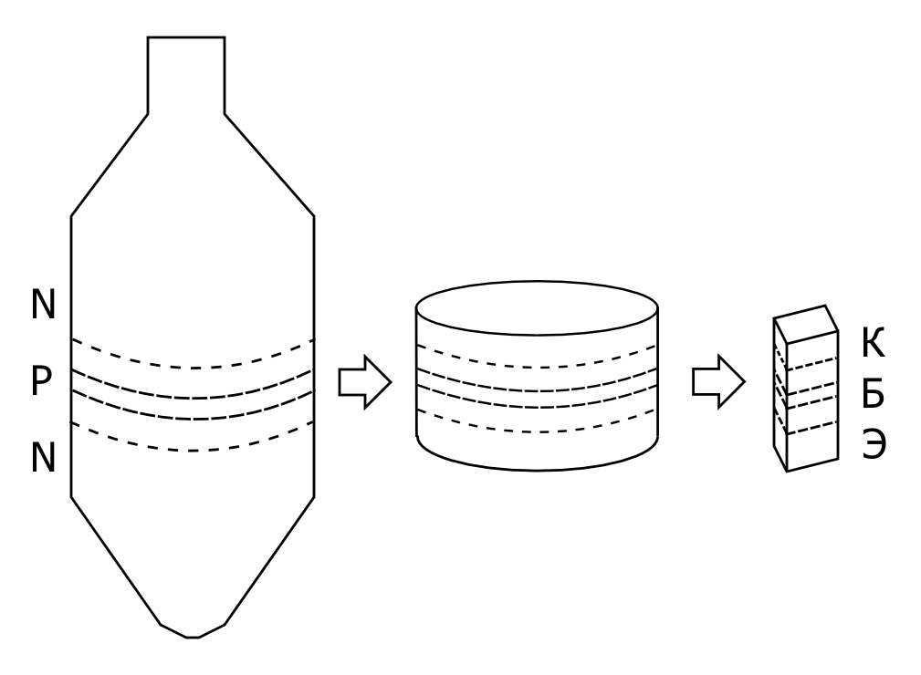 Технология производства транзисторов выращиванием из расплава - первая вообще технология производства плоскостных транзисторов (1950). Один монокристалл = одна пара pn-переходов = несколько десятков транзисторов. The first historical junction transistor technology (1950, Morgan Sparks): one crystal rod = one pair of junctions = a dozen or two of transistors.